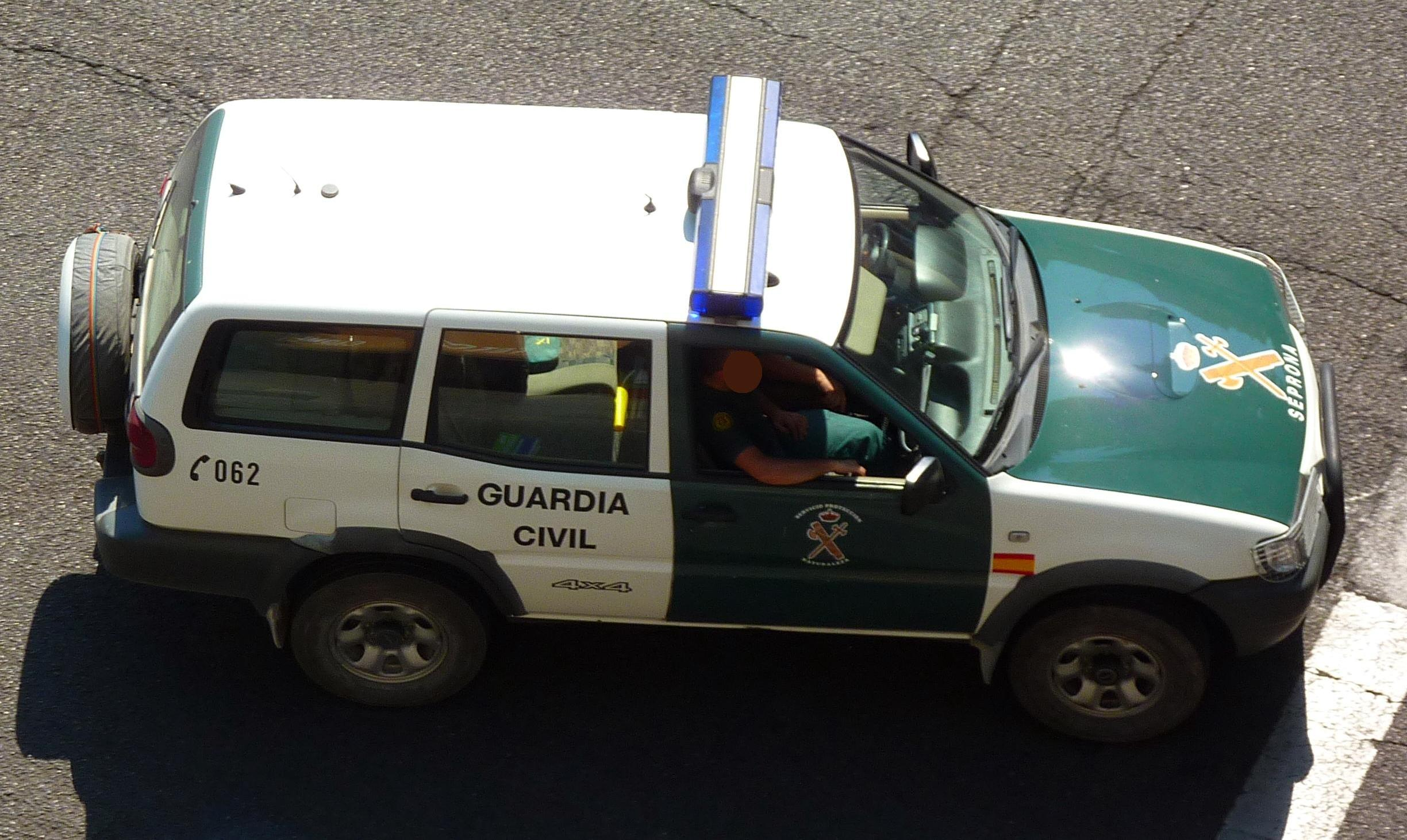 Nissan Terrano II largo del SEPRONA.